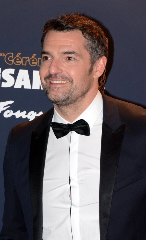 Arnaud Ducret à la cérémonie des César